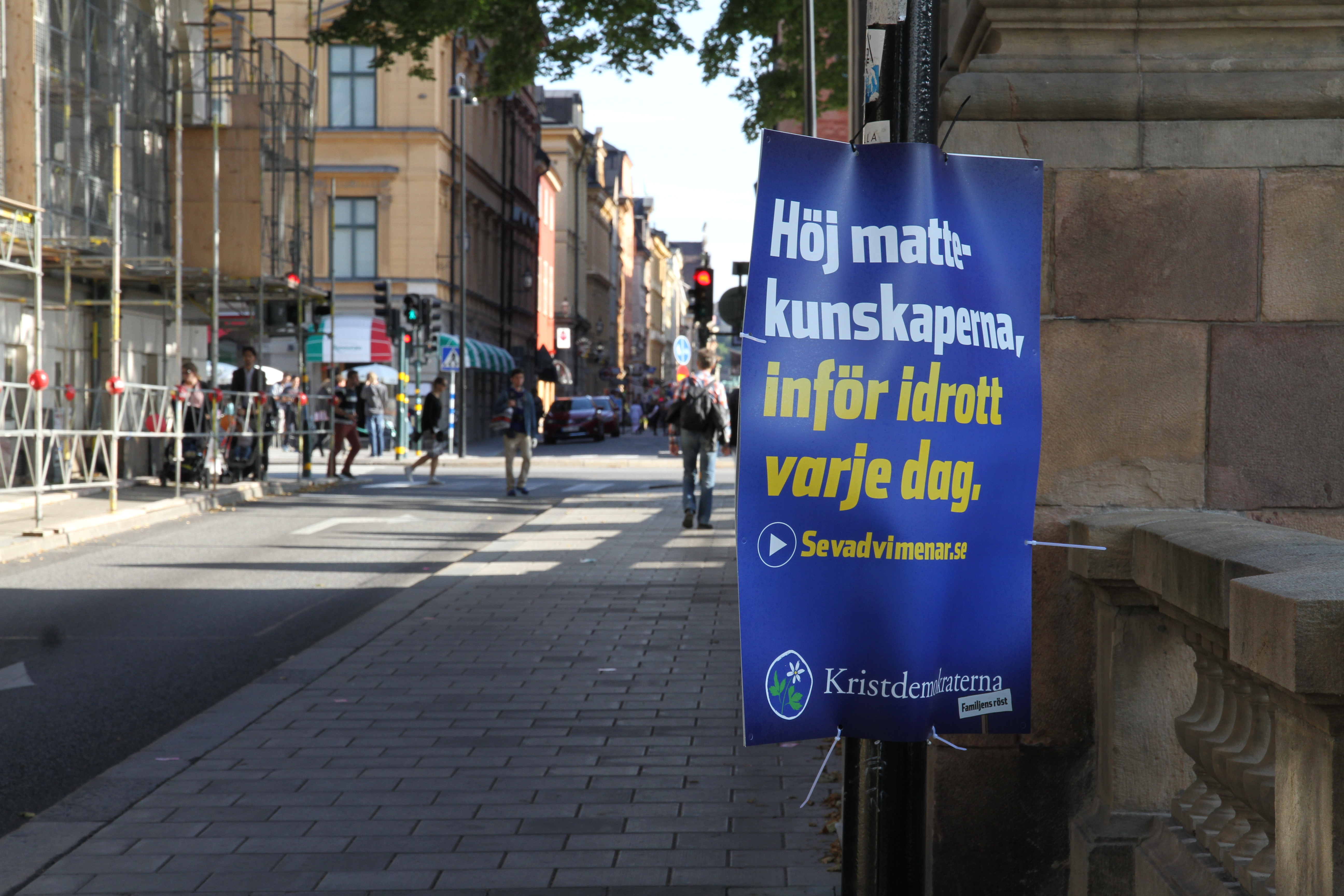 Valrörelsen 2014. Valaffisch för Kristdemokraterna 13 september 2014